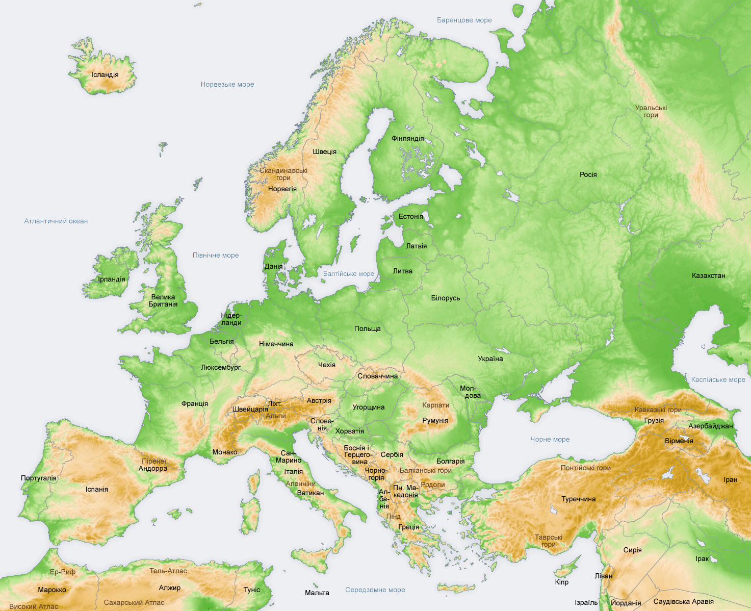 Топографія Європи, карта українською мовою